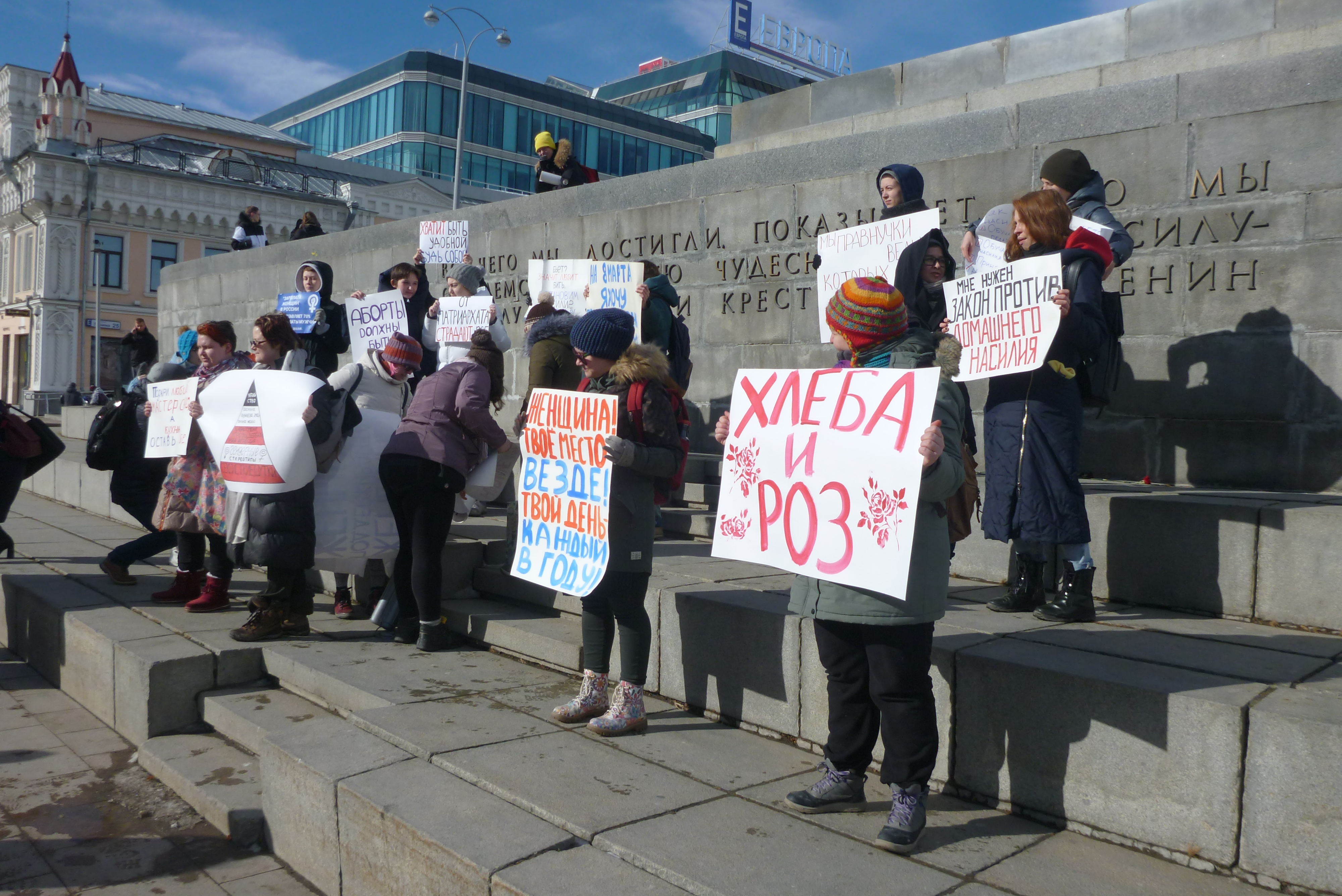 Пикет феминисток в центре Екатеринбурга 9 марта 2019 года